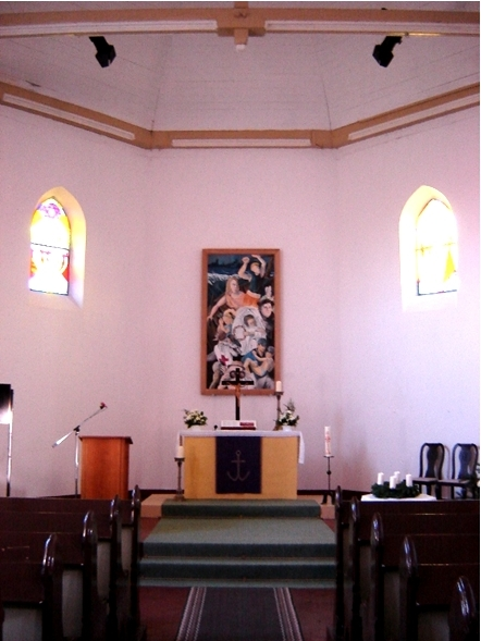 Reformationskirche in Magdeburg-Rothensee (Innenraum nach Westen)